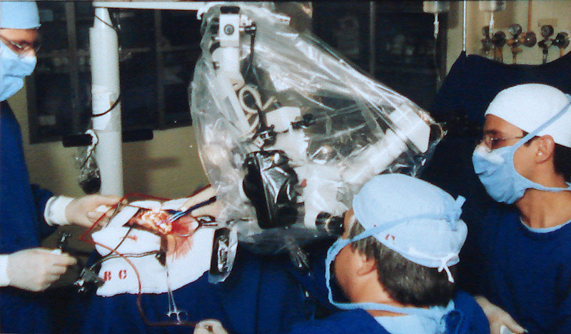 Equipe de neurocirurgia em ação no hospital da Beneficência Portuguesa de Porto Alegre, Brasil. Reprodução de original de autor e data desconhecidos, permissão concedida para publicação na Wiki pelo Arquivo da Beneficência.